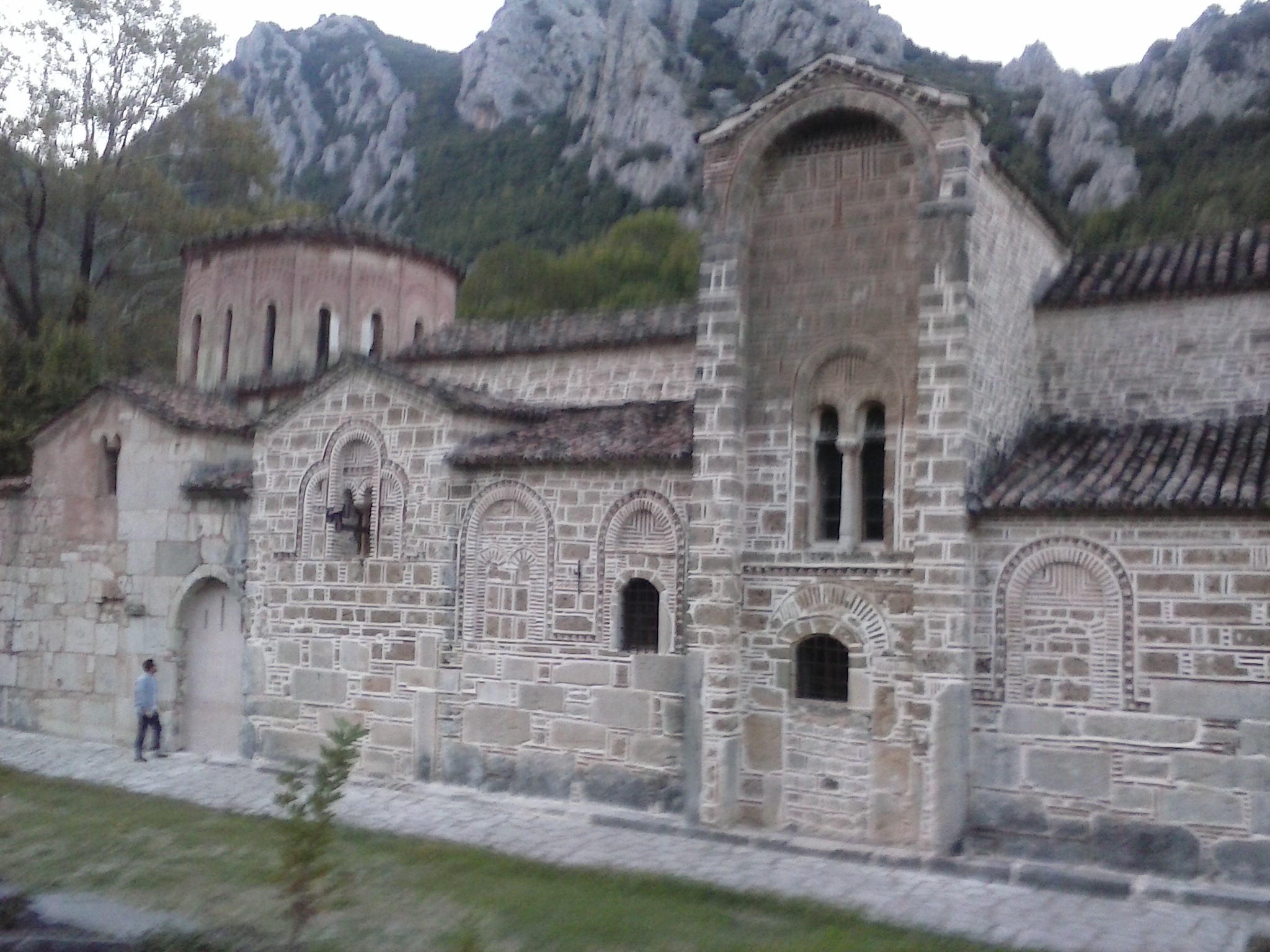 Ο Ναός της Πόρτα Παναγιάς«Οικία - Μουσείο Αλέξανδρου Παπαδιαμάντη»